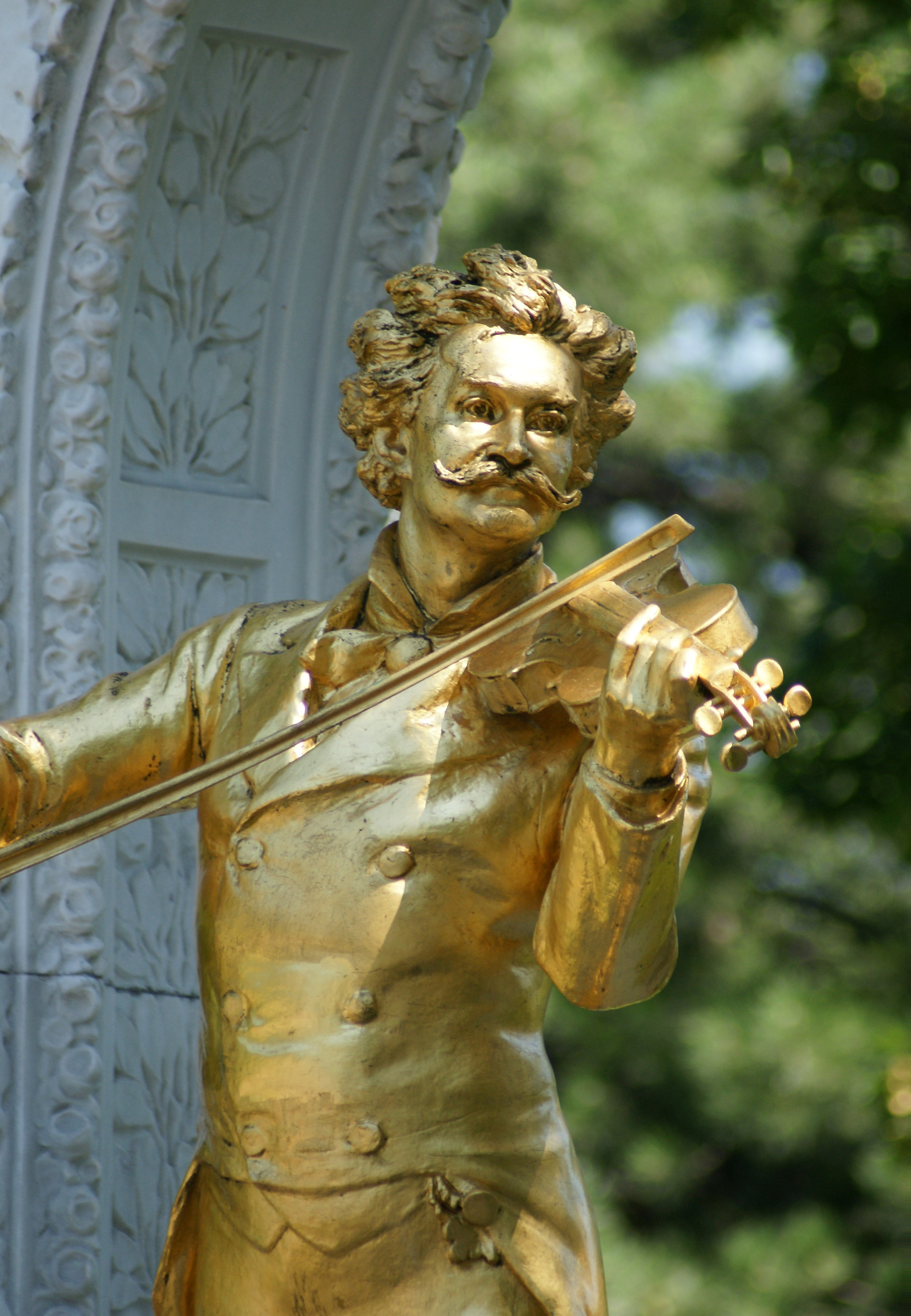 Das Johann Strauß (Sohn) Denkmal von Edmund Hellmer von 1921, im Wiener Stadtparks in Wien. Zu erreichen mit der U4 Stadtpark (U-Bahn-Station), deren Station von Otto Wagner gebaut wurde.